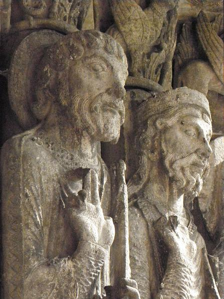 Saint-Pierre et le roi Salomon. Ébrasement droit du portail occidental de l'église prieurale Saint-Loup de Saint-Loup-de-Naud (77).